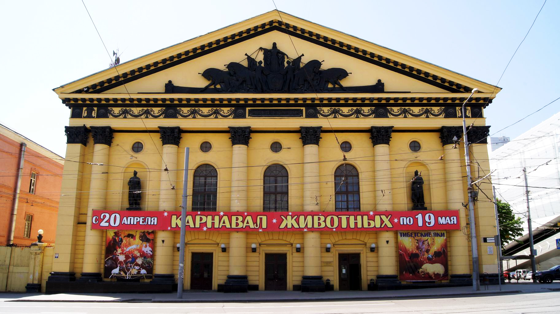 Цирк, Ростов-на-Дону